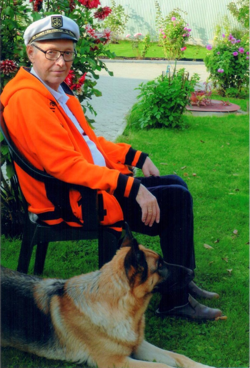 В Хотьково